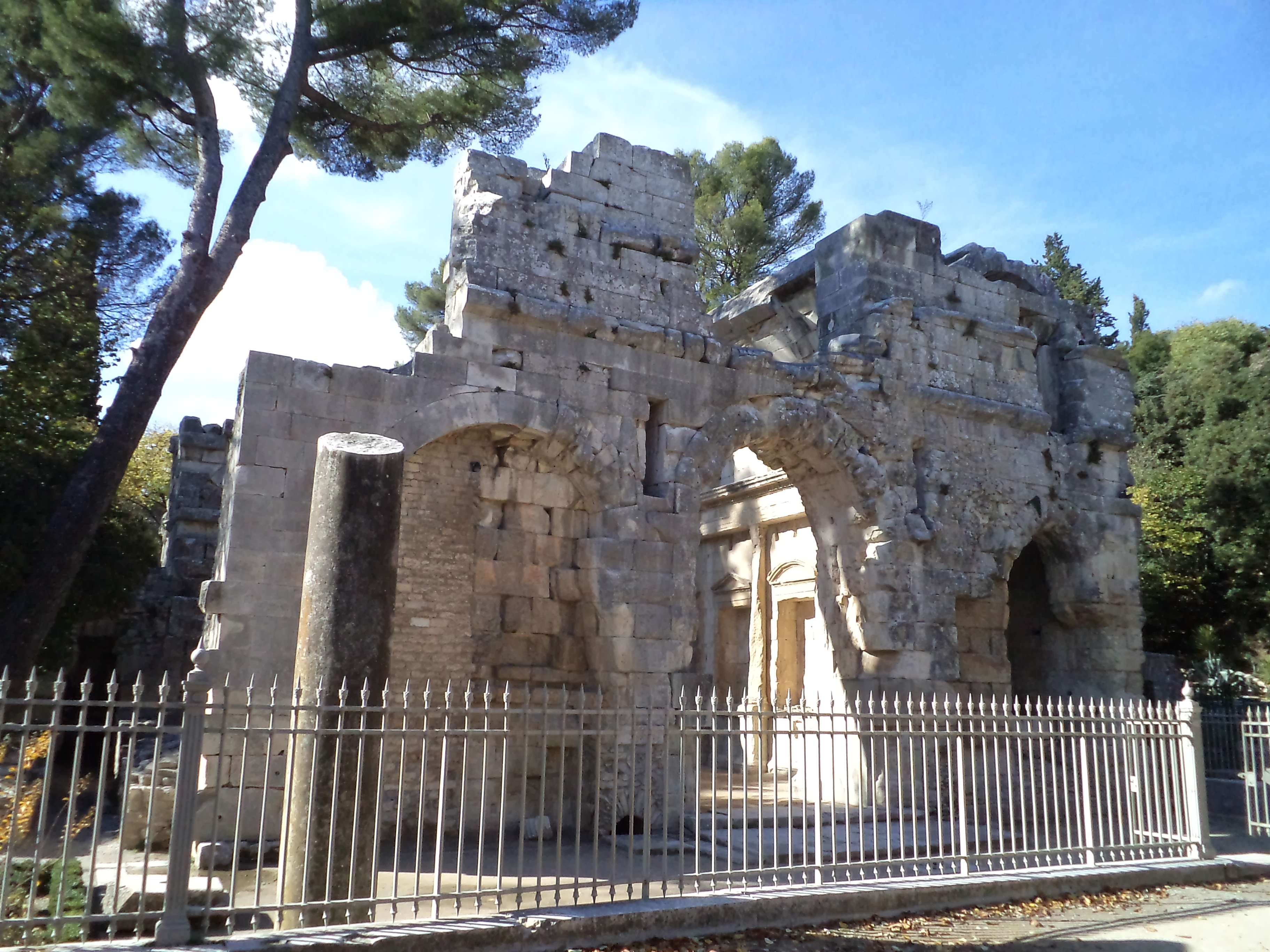 Le Temple De Diane